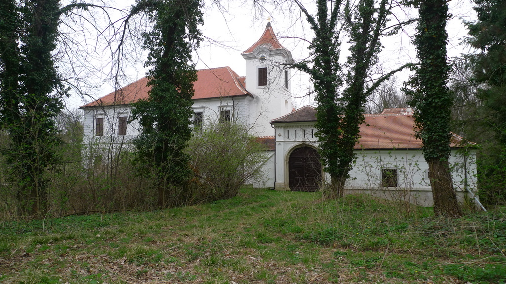 Schloss Nikitsch Ansicht ehemaliges Haupttor und Kapelle